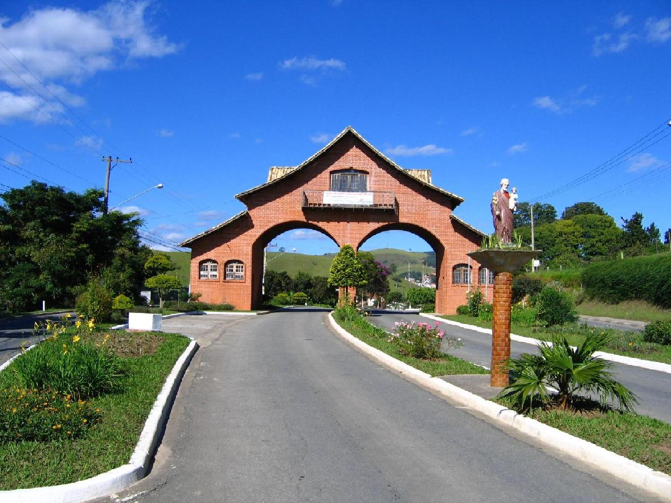 Portal de Salesópolis